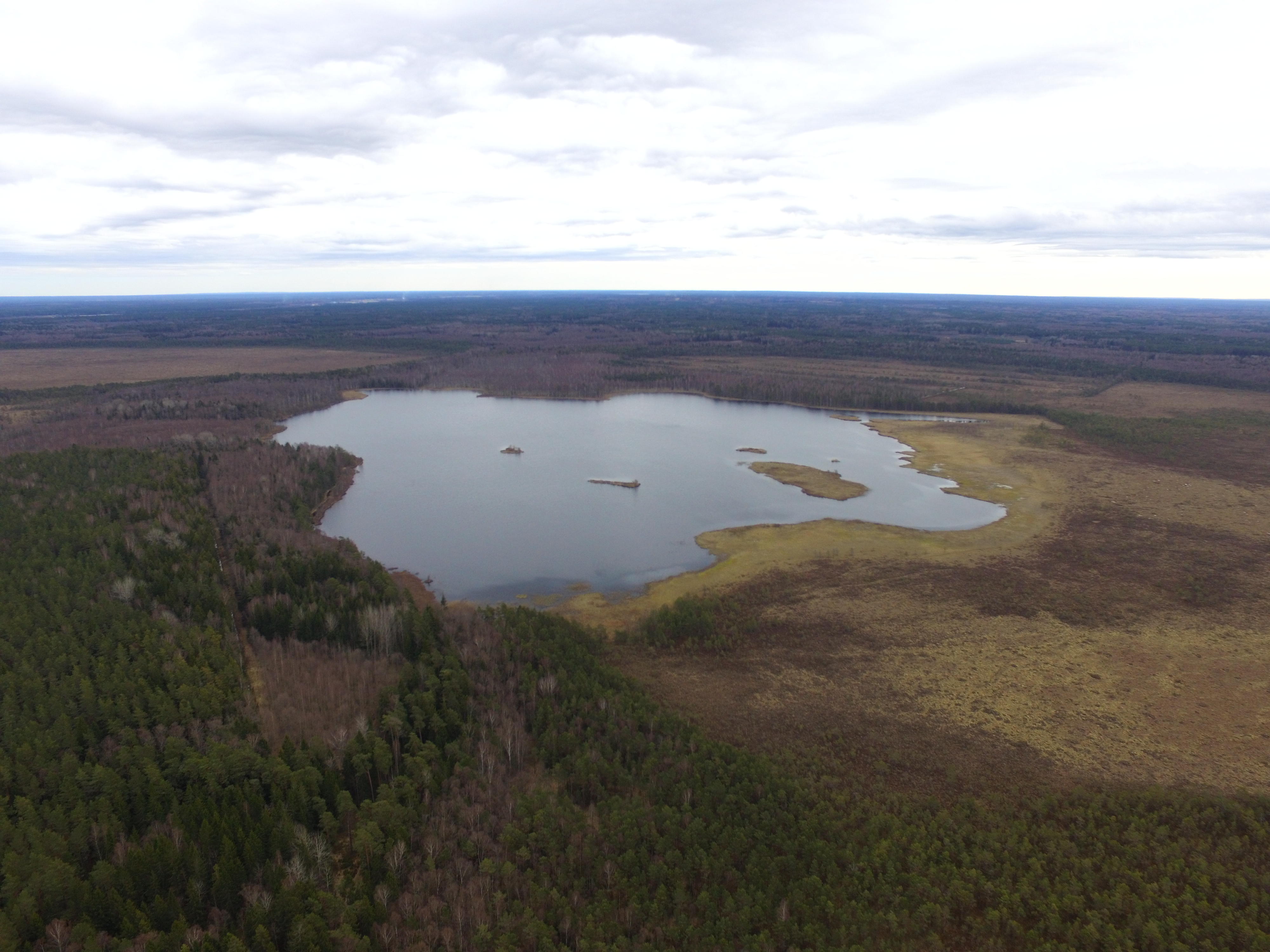 Klāņezers 08/04/2017